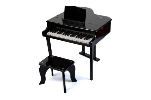 Toy piano 379-K-1 (by )